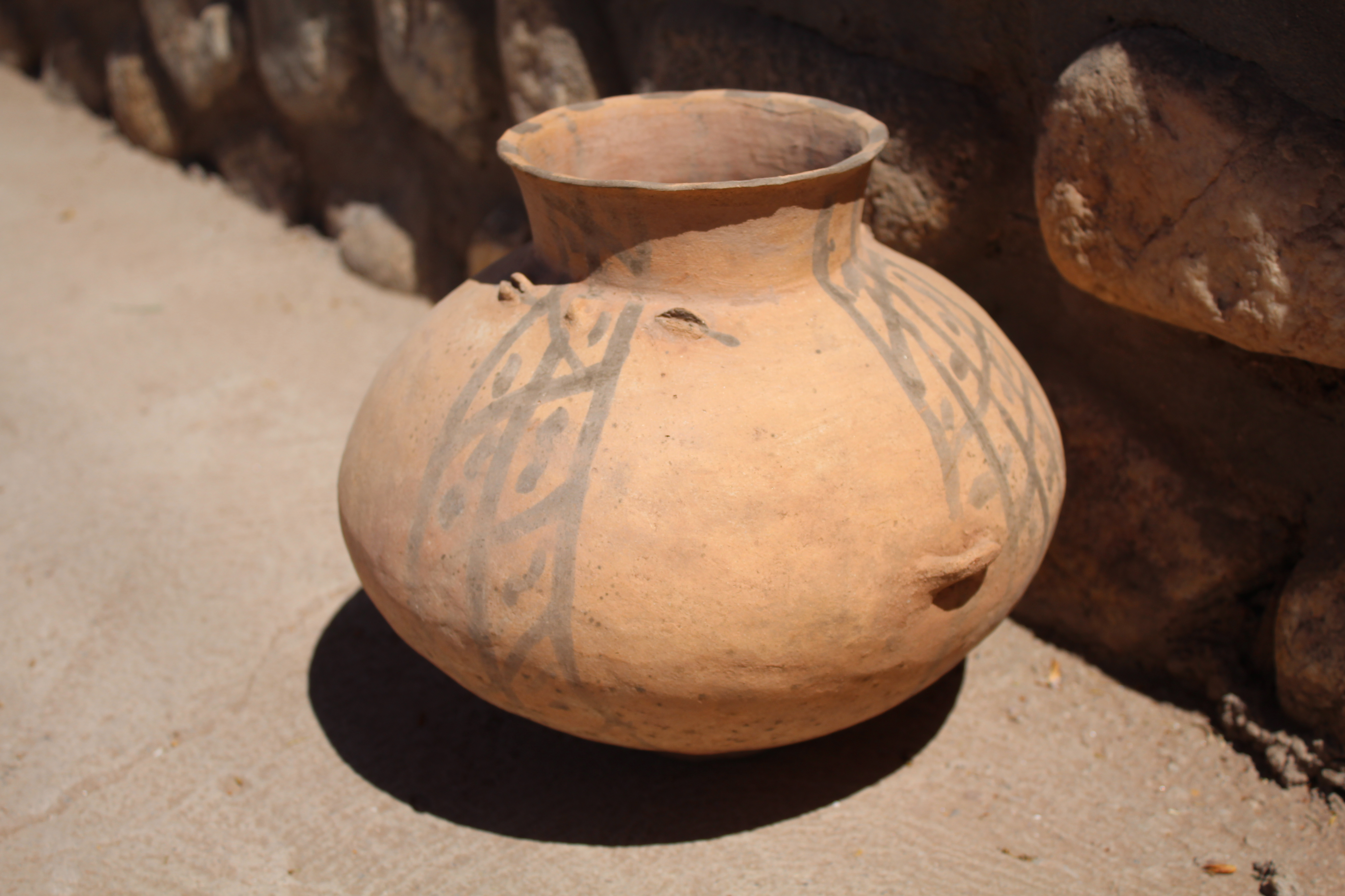 Esta vasija fue encontrada en un lugar llamado Las Eras Viejas, ubicado a 2 km de la plaza principal de Vinchina. Fue el asentamiento más importante de los Capayanes cuyo origen etimológico CAPAC: valle o puerto poderoso YAN: gente CAPAYAN (gente del valle). Los Capayanes eran de estatura mediana, practicaban intensamente la alfarería (vasijas con figuras geométricas, pucos etc)y la agricultura, cultivaban el maíz y el zapallo y se dedicaban al pastoreo de llamas. Realizaron continuos levantamientos y guerras contra los conquistadores, aún derrocados ofrecieron resistencia, finalmente fueron desarraigados y así este lugar quedó deshabitado